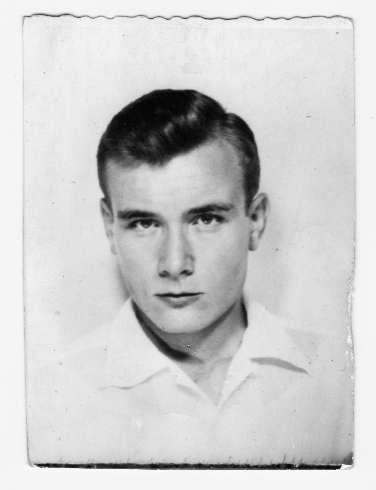 Porträtbild Adolf Opel (Automaten-Selbstauslöser)